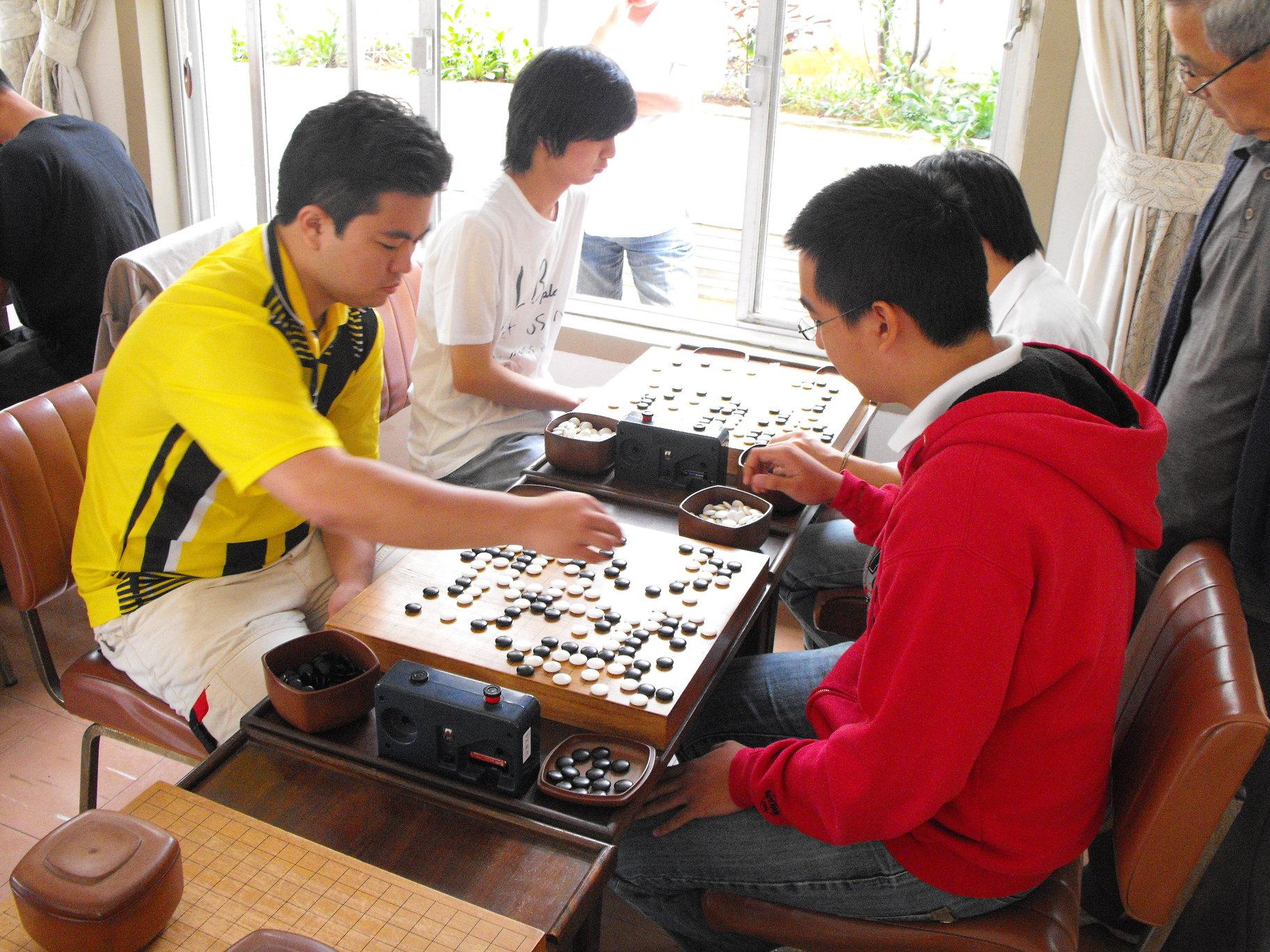 XHikaruNoGo_37